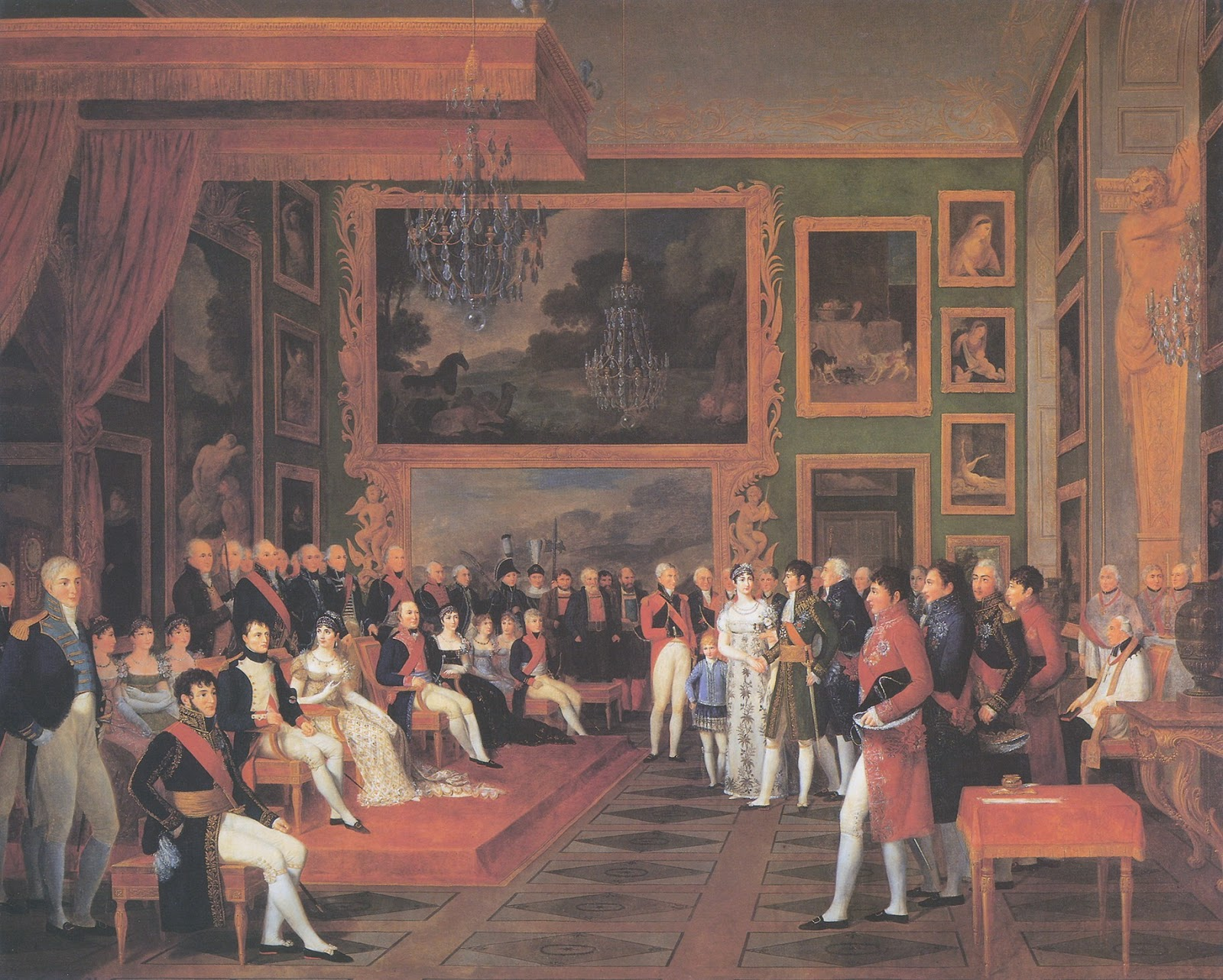 Il matrimonio di Eugène de Beauharnais e Amelia di Baviera a Monaco il 13 gennaio 1806, olio su tela, 189 x 230 cm, Versailles, Musée national du château et des Trianons